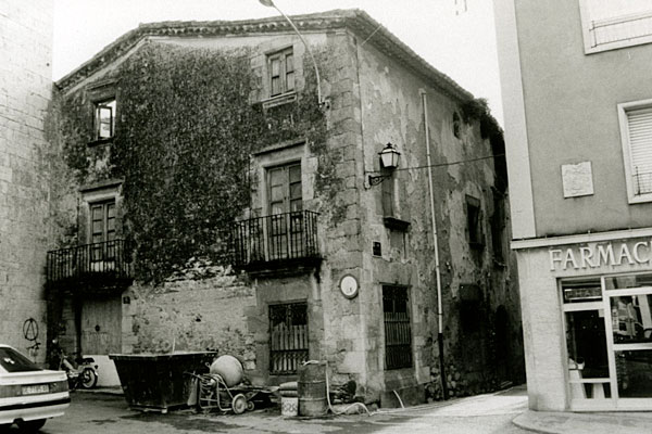 Obres de rehabilitació edifici de Can Rosés, aproximadament 1995 (Ajuntament de Palafrugell)